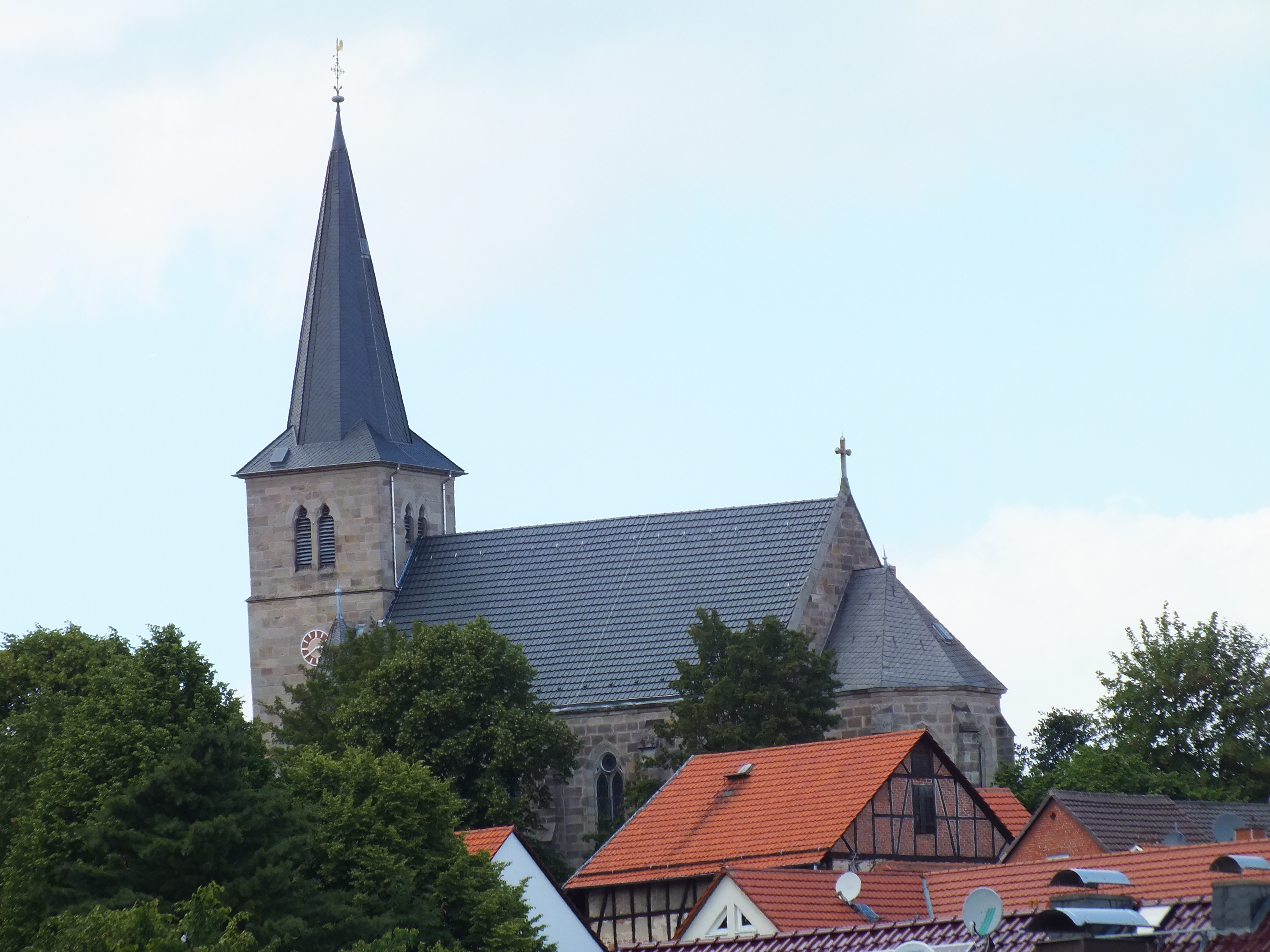 Blick vom Wolwerskopf auf die Kirche in Schauenburg-Hoof